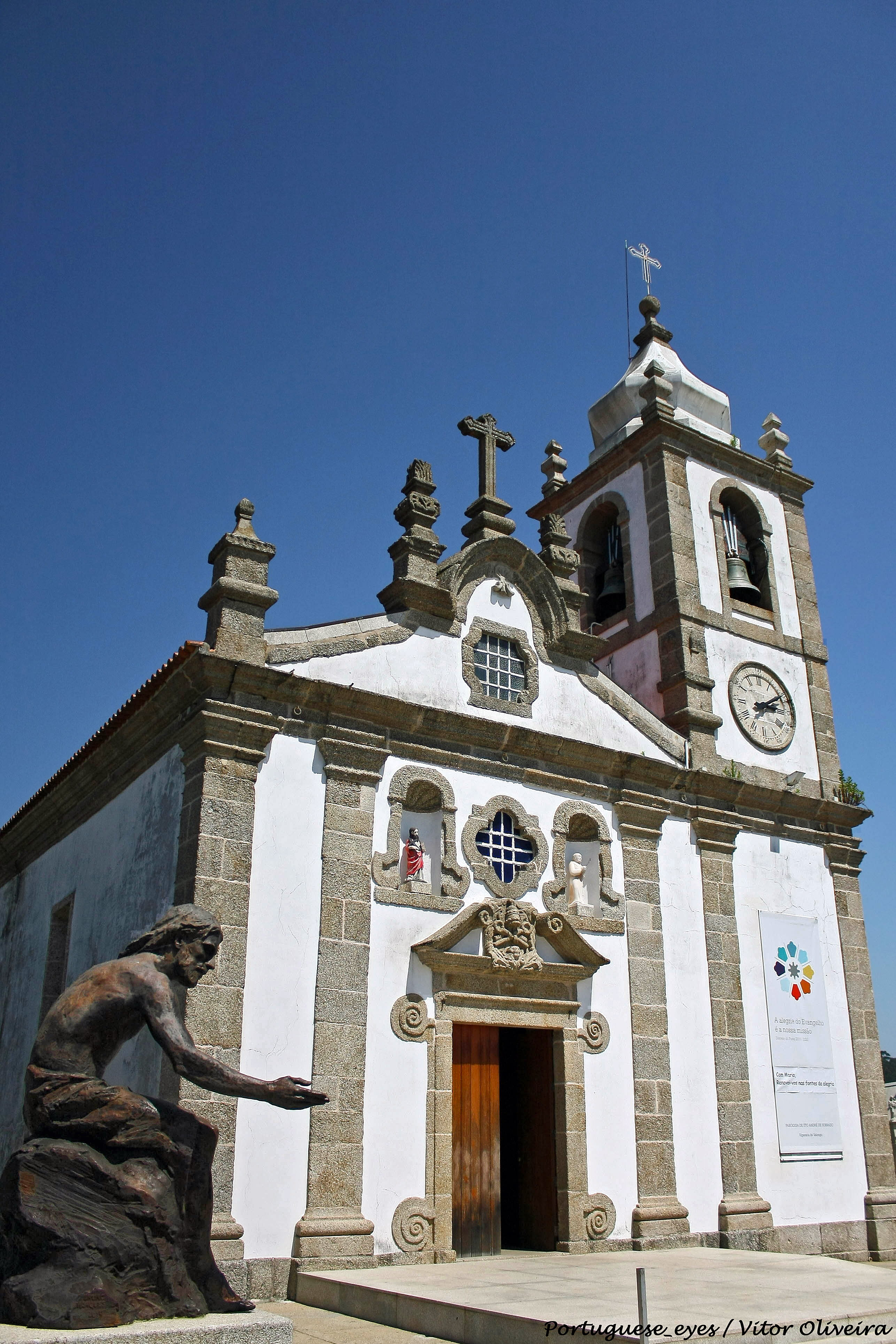 A igreja de construção seiscentista (1671) de uma só nave e harmoniosa traça barroca é dedicada a S.to André. A maior parte do seu património é do séc. XVIII. Ostenta no seu interior azulejo decorativo e talha dourada que tornam este templo no expoente máximo do barroco no concelho de Valongo. O retábulo mor, feito num período de coexistência do barroco com o rococó, recebe duas bem conseguidas imagens de S.to André e de S. Francisco de Assis. A sobrepujar o retábulo duas curiosas alegorias à Fé e à Esperança. De destaque é ainda o perfeito trabalho de talha do teto da capela-mor, que mais parecem bordados executados em madeira, onde se encontram representados desde aves a anjos músicos. A Ceia de Cristo, do famoso pintor Francisco José de Resende, é digna de destaque. A edificação da torre sineira é um projeto posterior, concluída somente em 1874. A casa paroquial de 1691 foi alvo de intervenções recentes. Na envolvente encontra-se um fontanário granítico também barroco. No Passal, onde existe um cruzeiro e um elemento escultórico dedicado aos Bugios e Mourisqueiros, é onde, no dia de S. João, decorrem as tradicionais Bugiadas e Mouriscadas. Dados do mapa ©2017 Google Termos de Utilização Comunicar um erro no mapa Mapa Satélite Largo do Passal, 4440-337 Sobrado Valongo +351 224 111 234 8h-18h. Encerra à 2.ª feira.